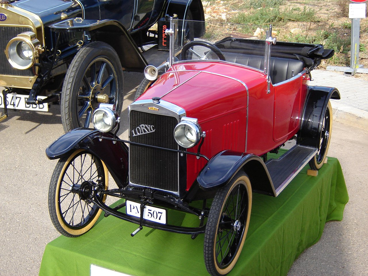 Modell eines LORYC